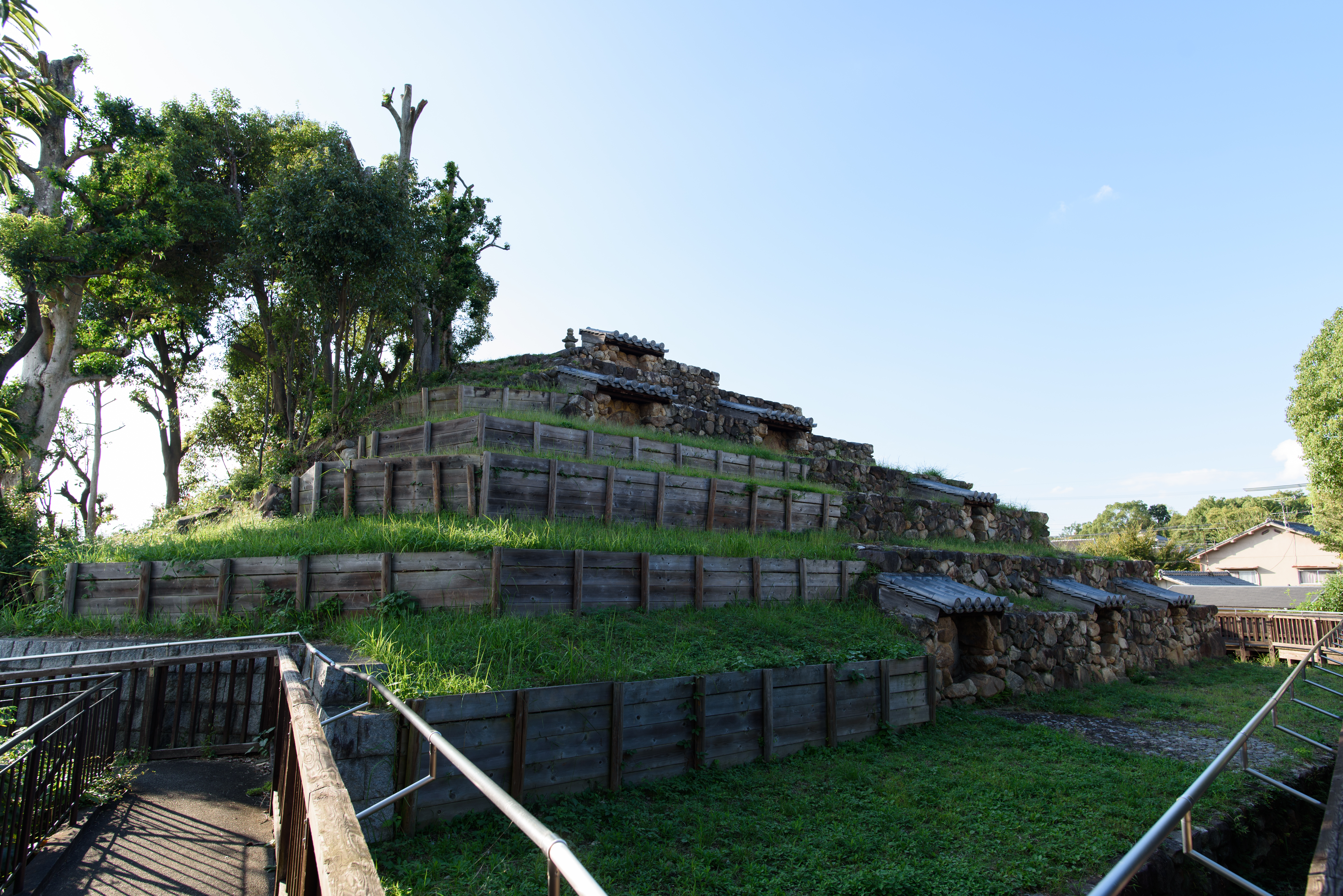 頭塔 南東側より撮影（奈良市高畑町）